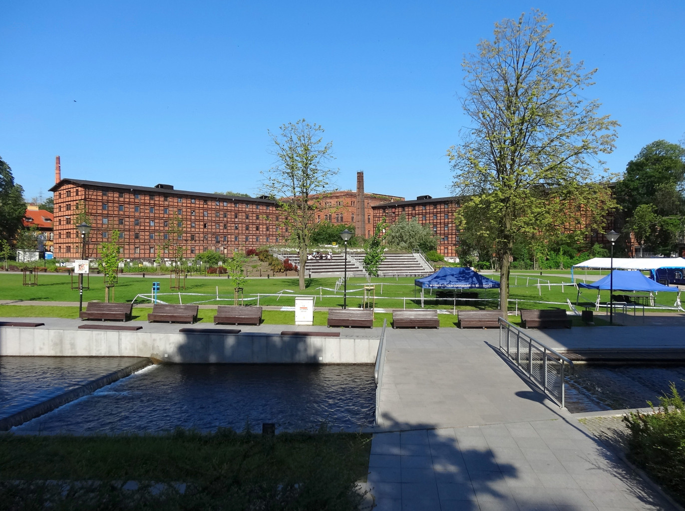 Kaskada Międzywodzie na Wyspie Młyńskiej w Bydgoszczy odtworzona w 2007 roku